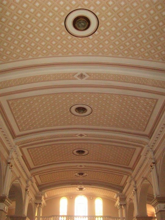 Se observa al fondo el coro alto ubicada en la cabecera junto a los vitrales de la fachada de la parroquia